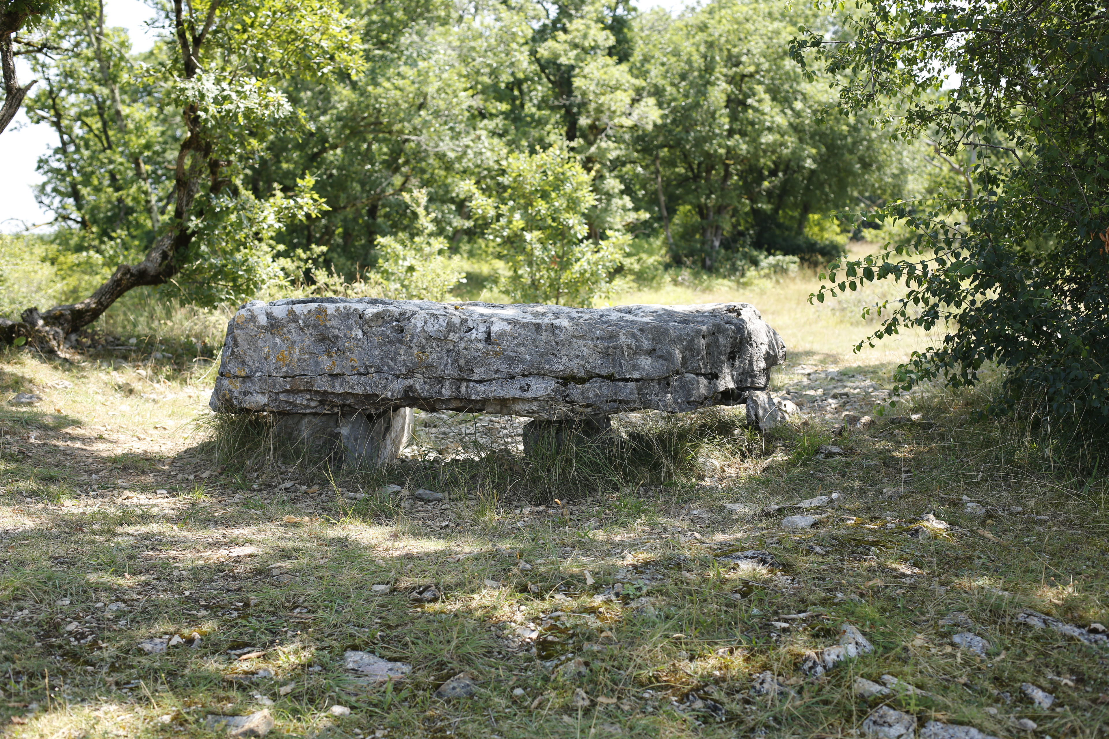 Dolmen de la Chassagne à Saint-Cernin-de-Larche : côté nord-ouest.